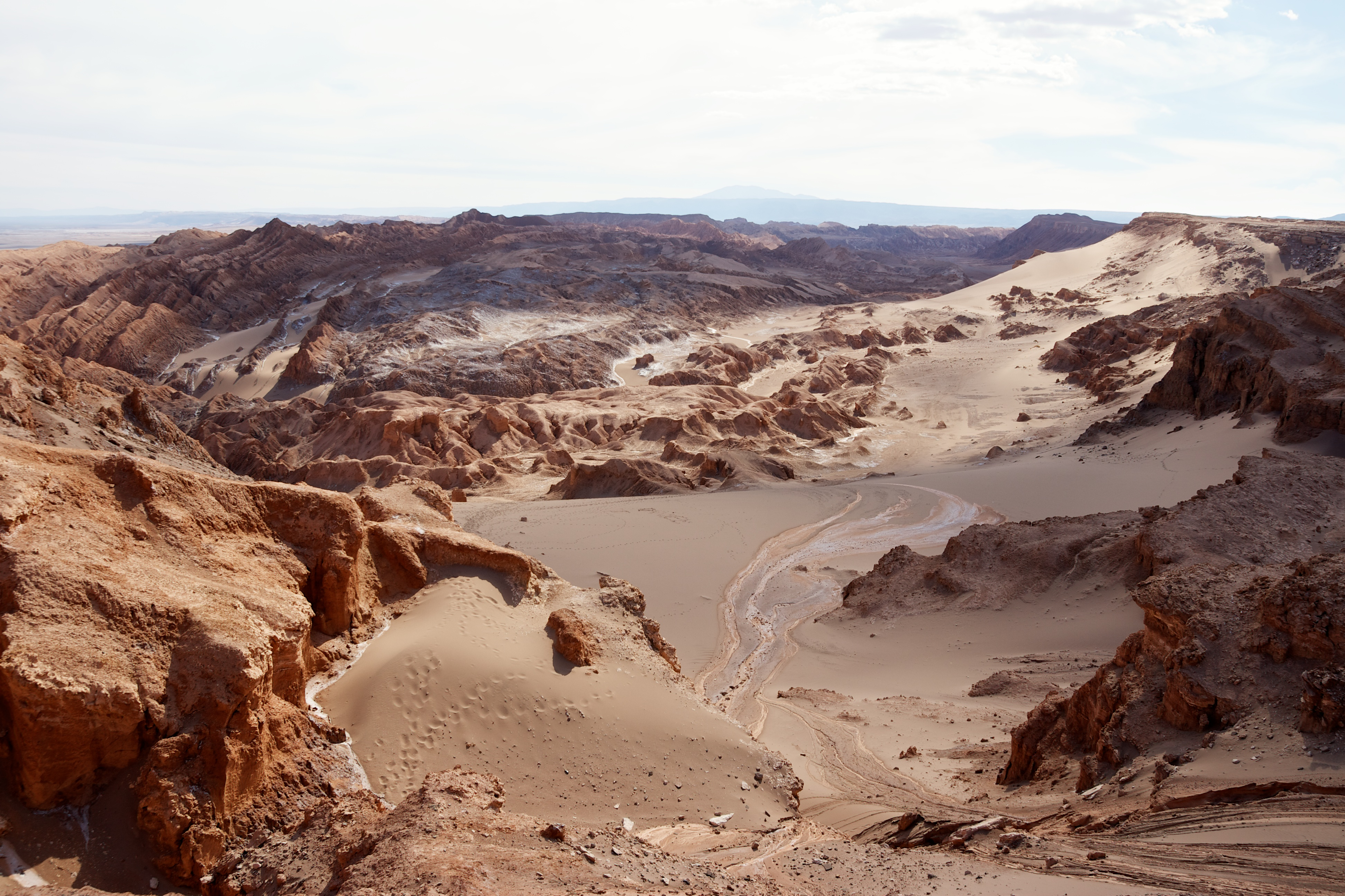 Valle de la Luna